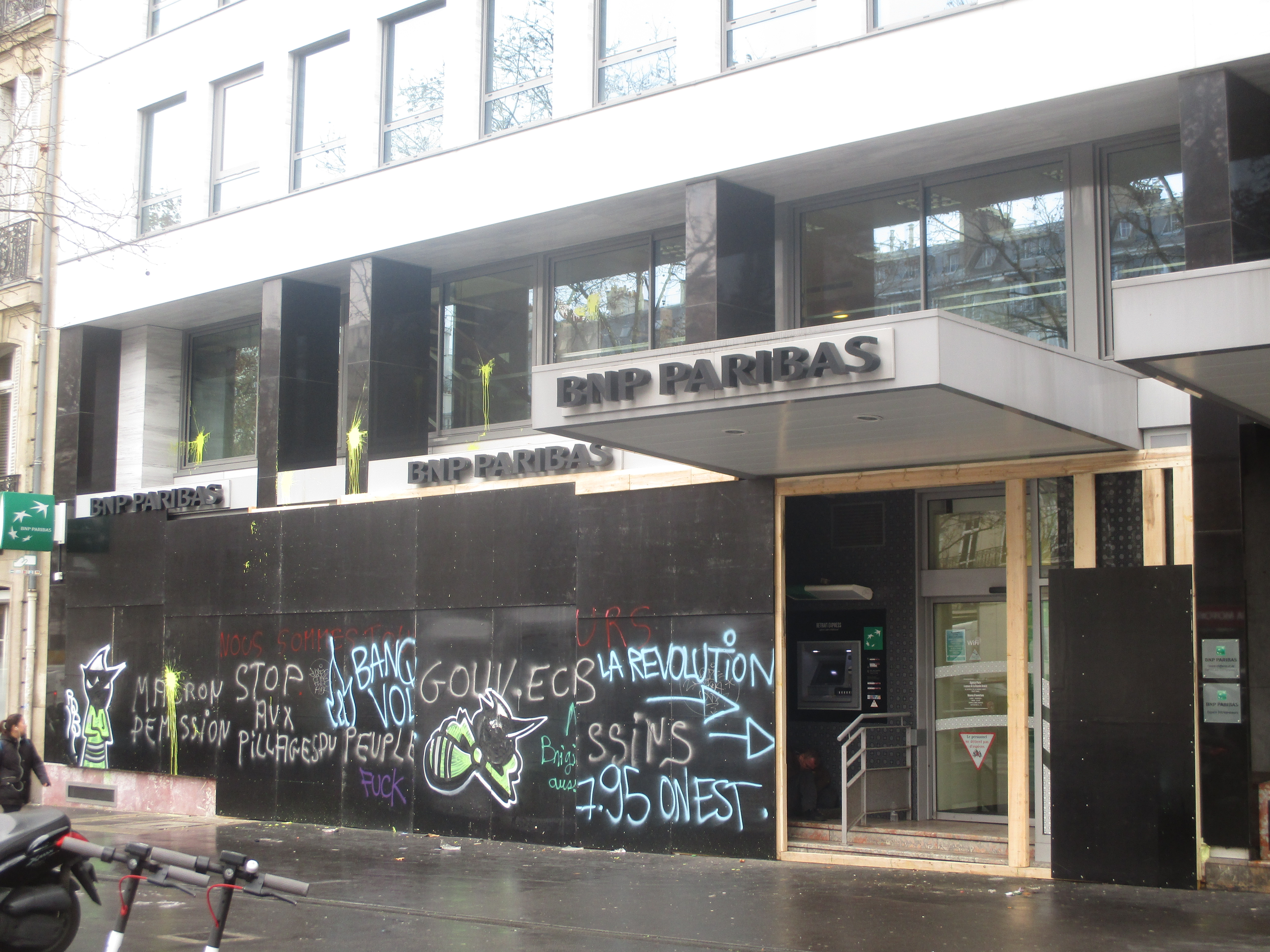 Banque vandalisée avenue de la Grande-Armée à Paris, le 1er décembre 2018.